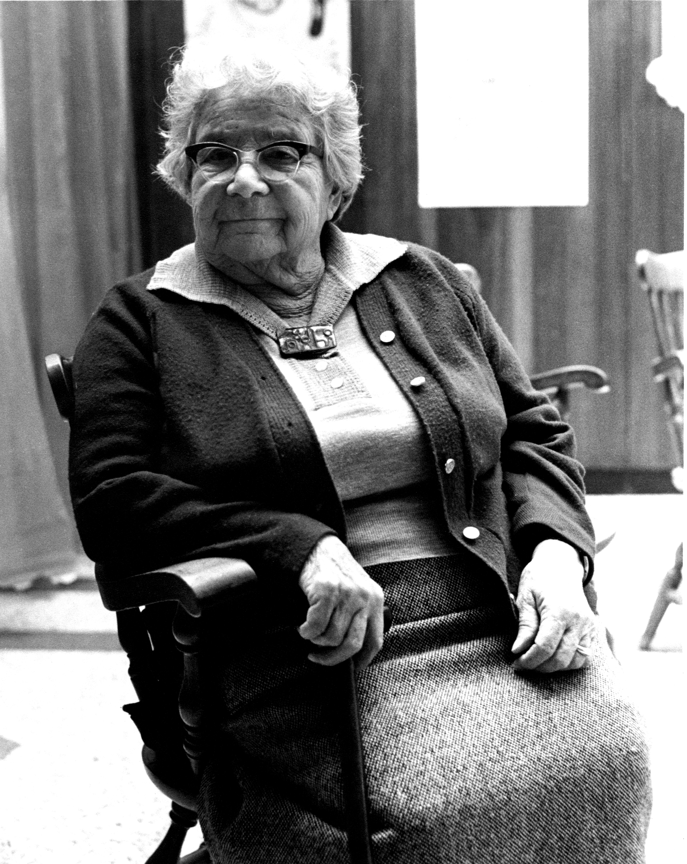 מרים זינגר וותיקות דגניה הייתה גננת עלתה לישראל בשנת 1920